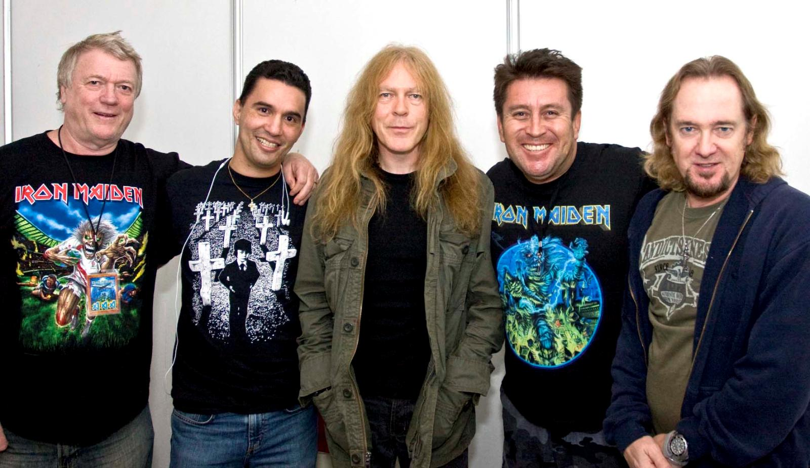 Iron Maiden y promotores